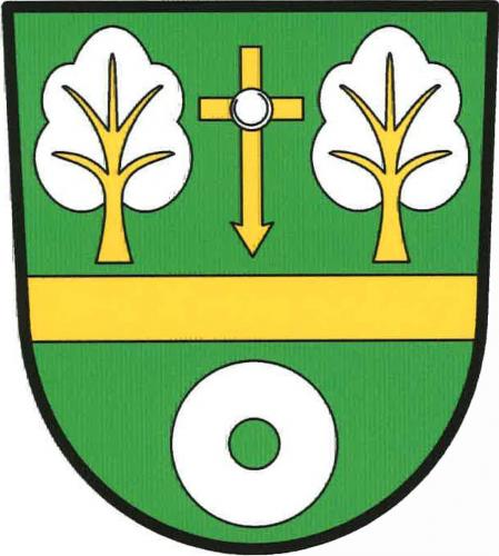 znak, Cejle, okres Jihlava